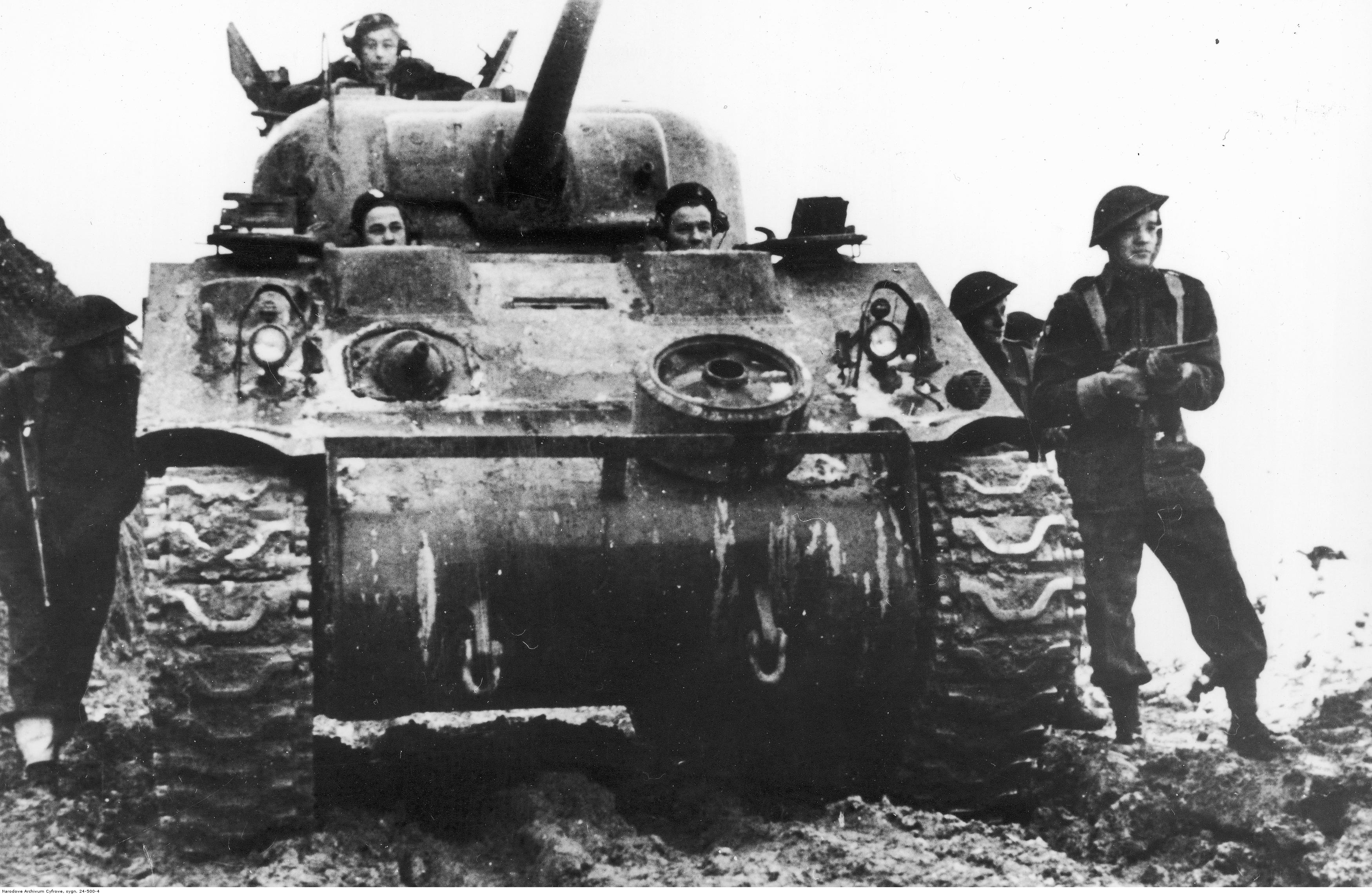 Działania bojowe 2 Korpusu Polskiego podczas walk w Apeninie Emiliańskim. Spieszeni ułani podolscy z czołgami M4 Sherman 4 Pułku Pancernego "Skorpion" pod Predappio; listopad 1944. Archiwum Fotograficzne Tadeusza Szumańskiego. Sygnatura: 24-500-4